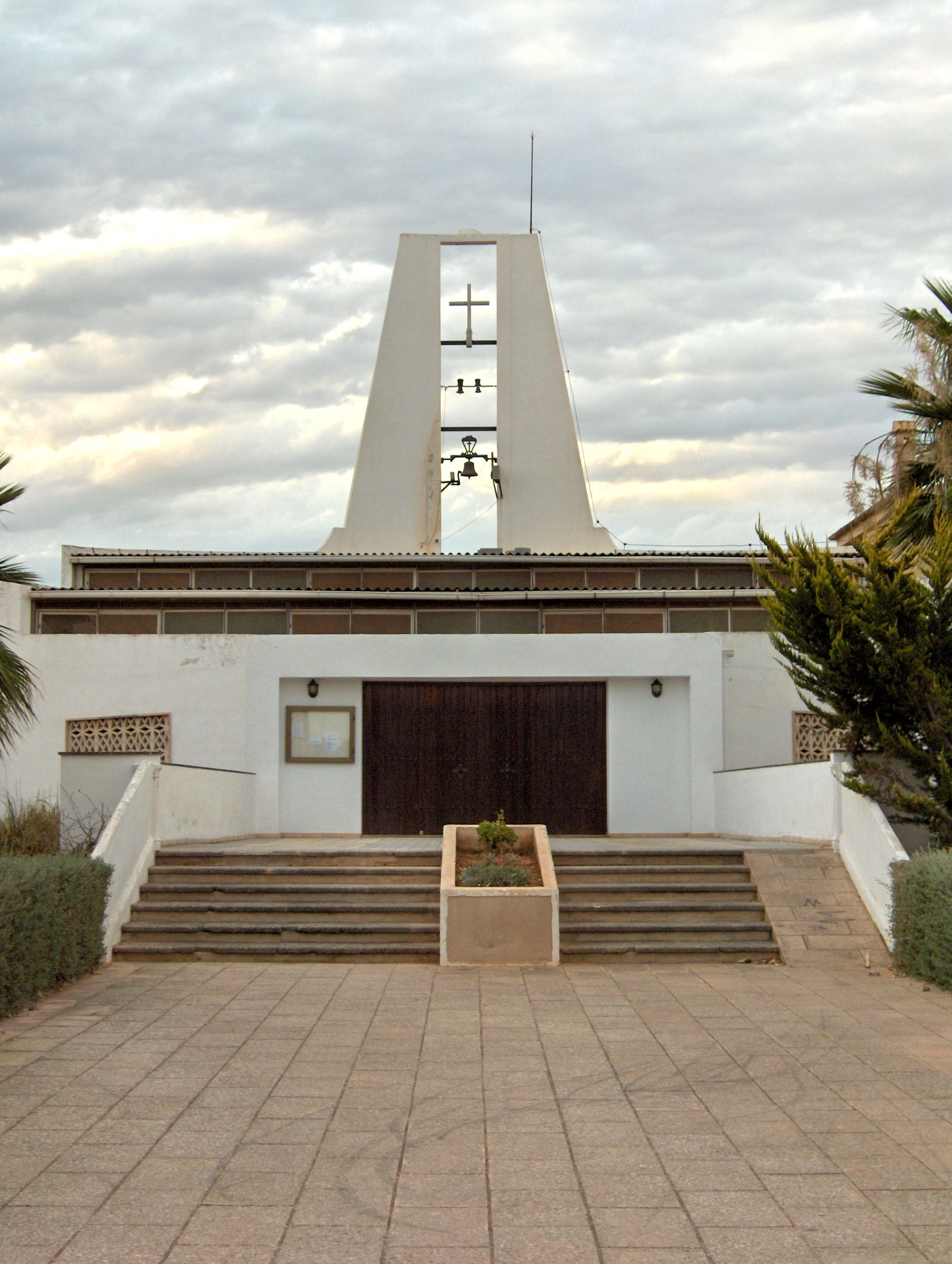 Església de S'Estanyol de Migjorn (Llucmajor, Mallorca), obra de l'arquitecte llucmajorer Sebastià Gamundí.